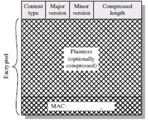 tlskompresimi